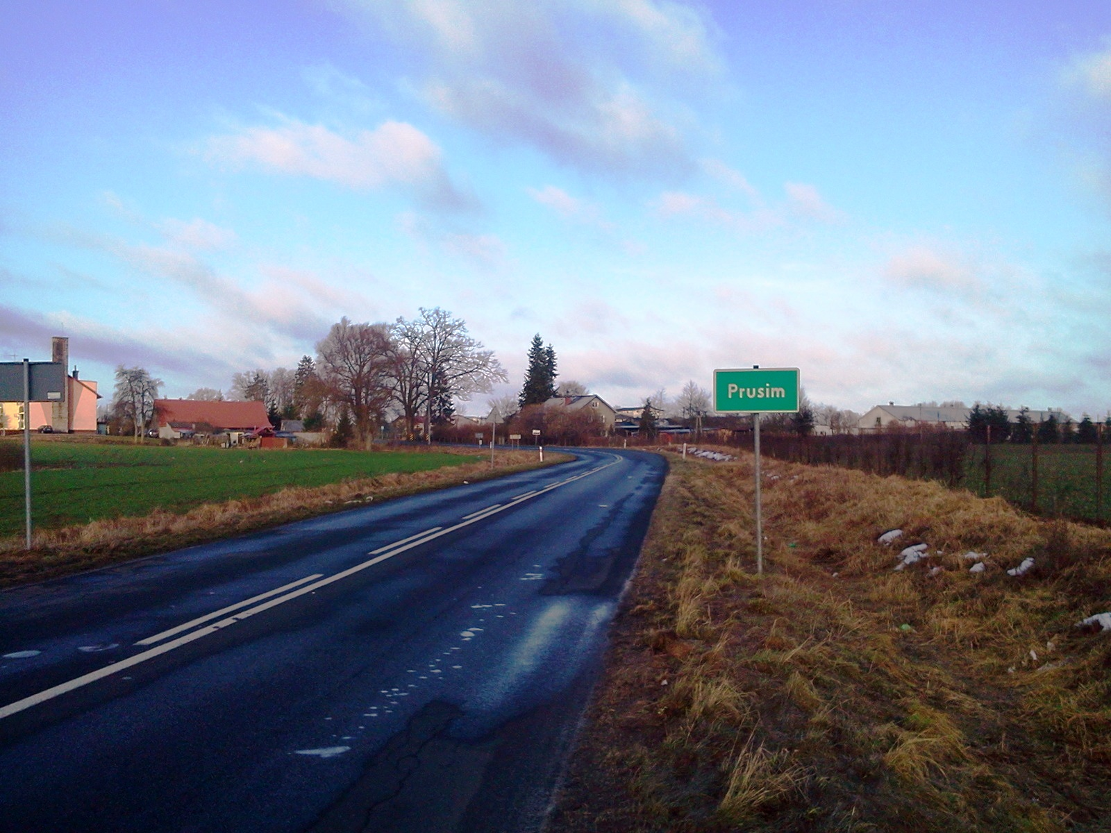 Prusim